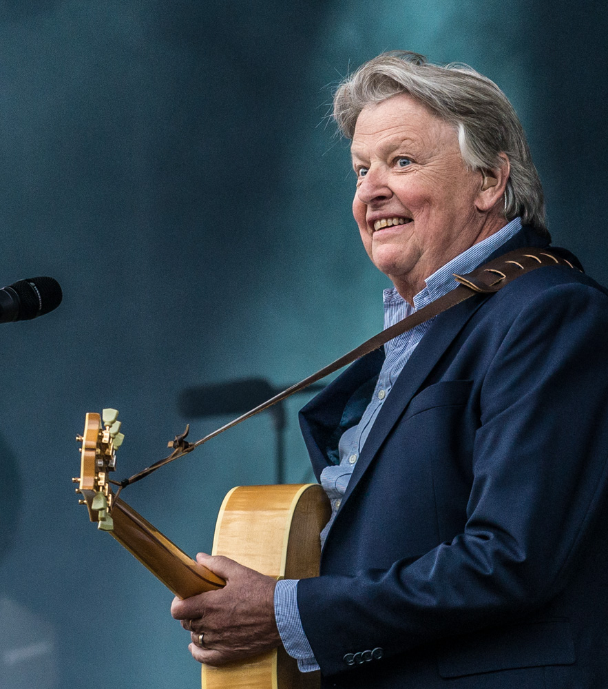 Sven-Ingvars uppträder inför en fulltalig publik på Gröna Lund i Stockholm den 12 augusti 2016. Sven-Erik Magnusson på gitarr.